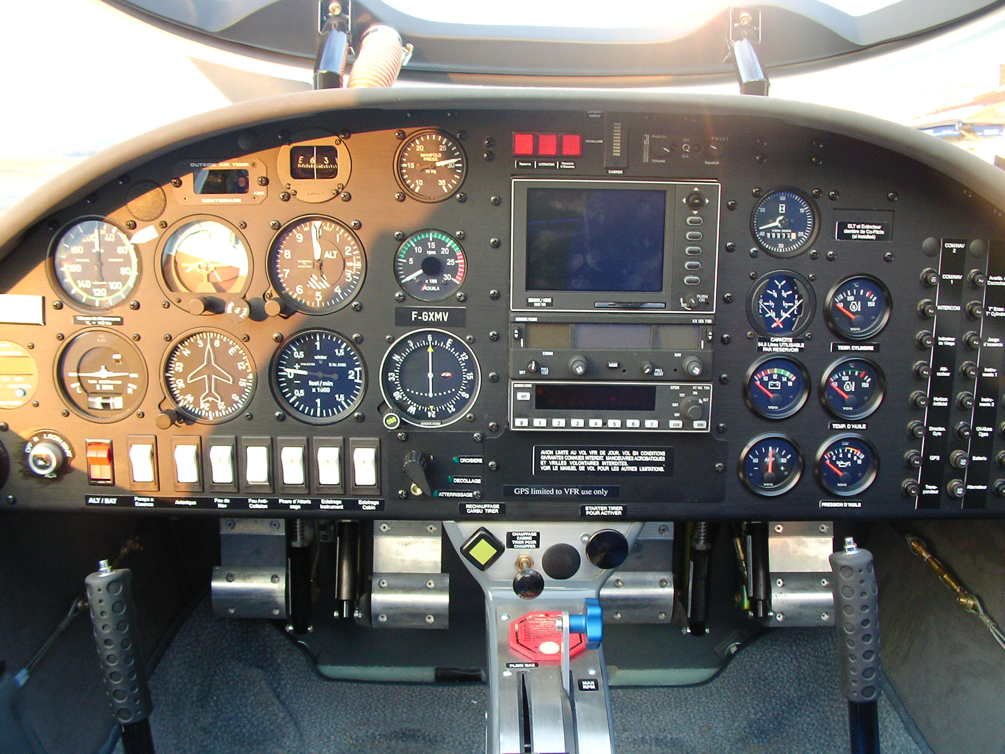 Le cockpit d'un Aquila AT01.